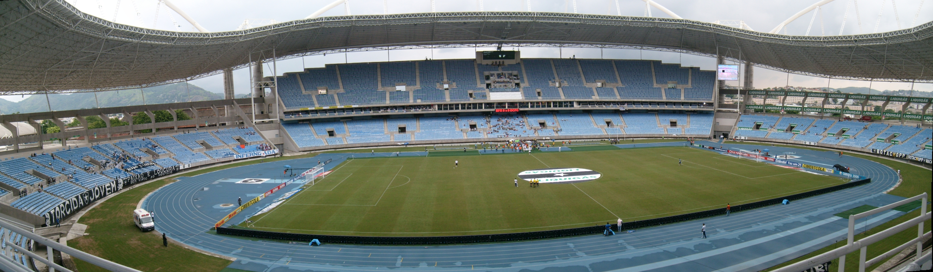 Panorâmica do Estádio Olímpico João Havelange, o Engenhão, (visto da sua ala Leste) antes da partida Botafogo 4-0 Duque de Caxias, pelo segundo turno do Campeonato Carioca de Futebol de 2009.